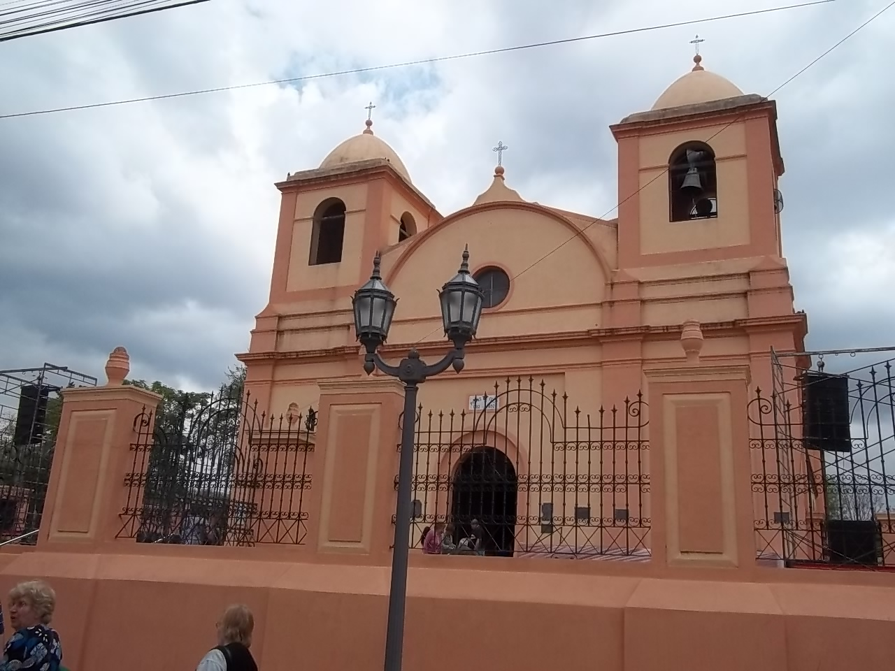 Iglesia parroquial de Tulumba, denominada la Catedral del Norte.